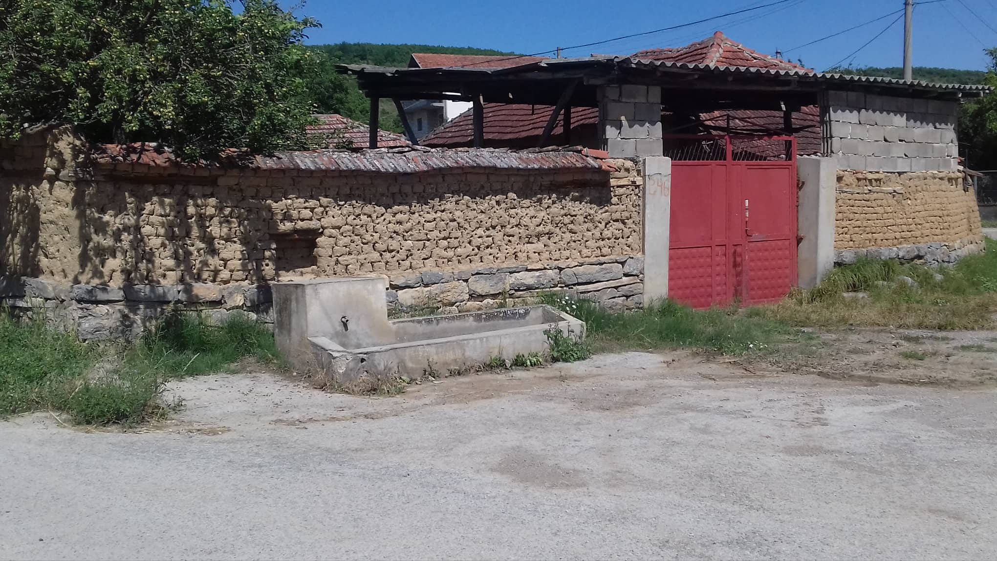 На овој слици се може видети Пејска чесма и трг око ње у Пејнској махали у селу Коретишту. Она се у времену када се користио стари пут налазила у центру села и на њој се окупљао народ о празницима. Слику сам направио сам својим апаратом. In this picture, you can see Paeonian fountain and the square around in Koretište village. At the time when the old road was used, it was located in the center of the village, and people gathered there for holidays. I made the picture myself with my camera.